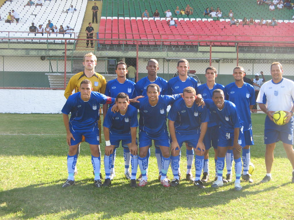 Equipe profissional do Goytacaz Futebol Clube em 2007.